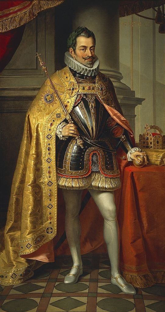 Ritratto di Mattia d'Asburgo